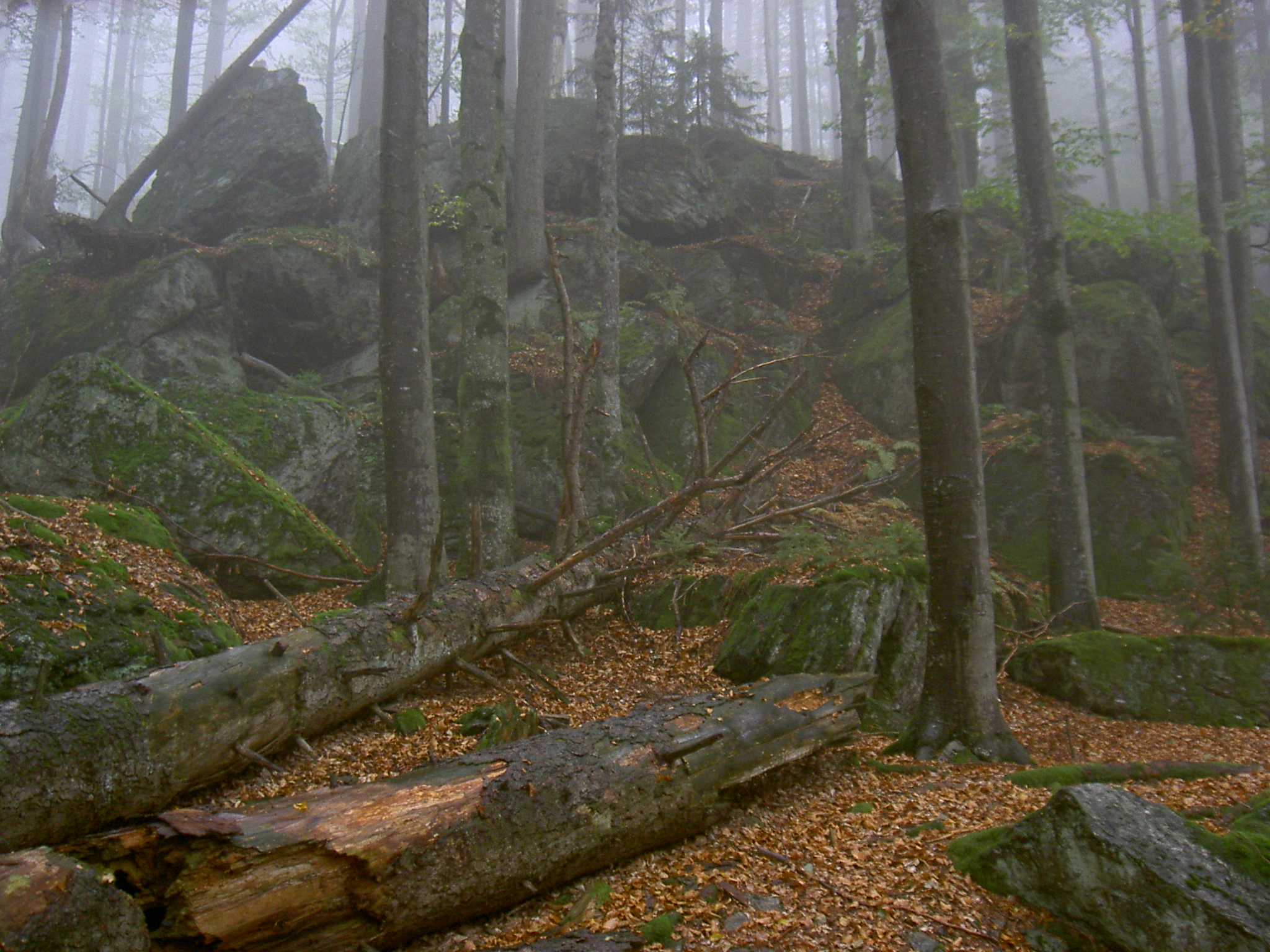 Parc National de la Forêt bavaroise, Bavière, Allemagne Auteur : --Topf octobre 2003 GFDL